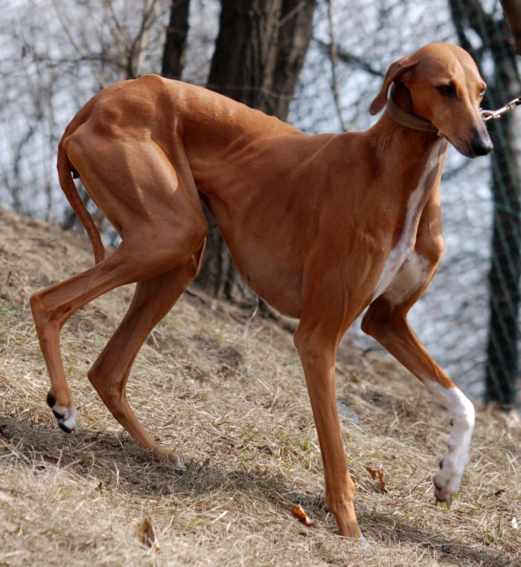 Azawakh